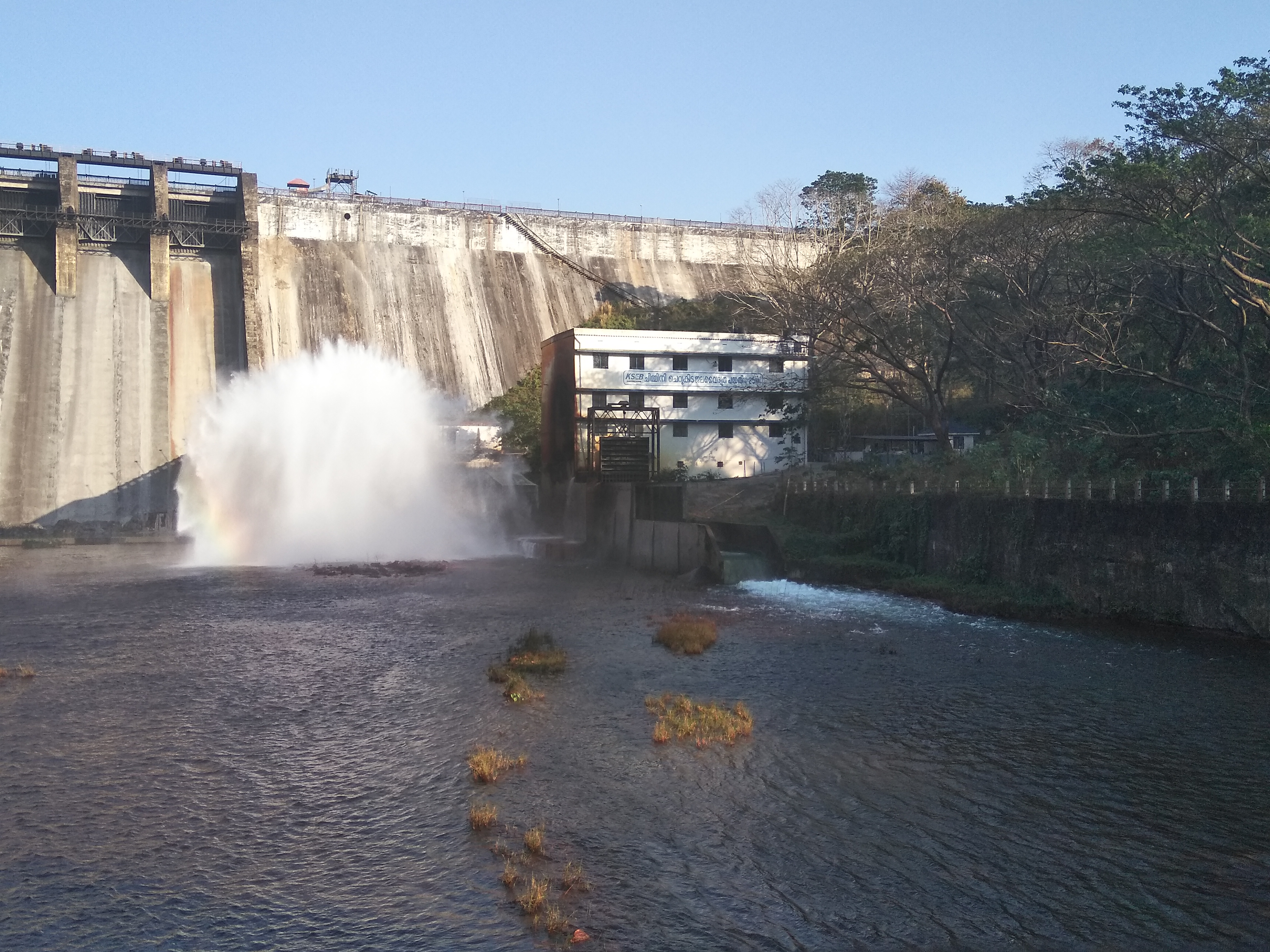 ചിമ്മിണി ഡാം മുൻഭാഗത്തു നിന്ന്